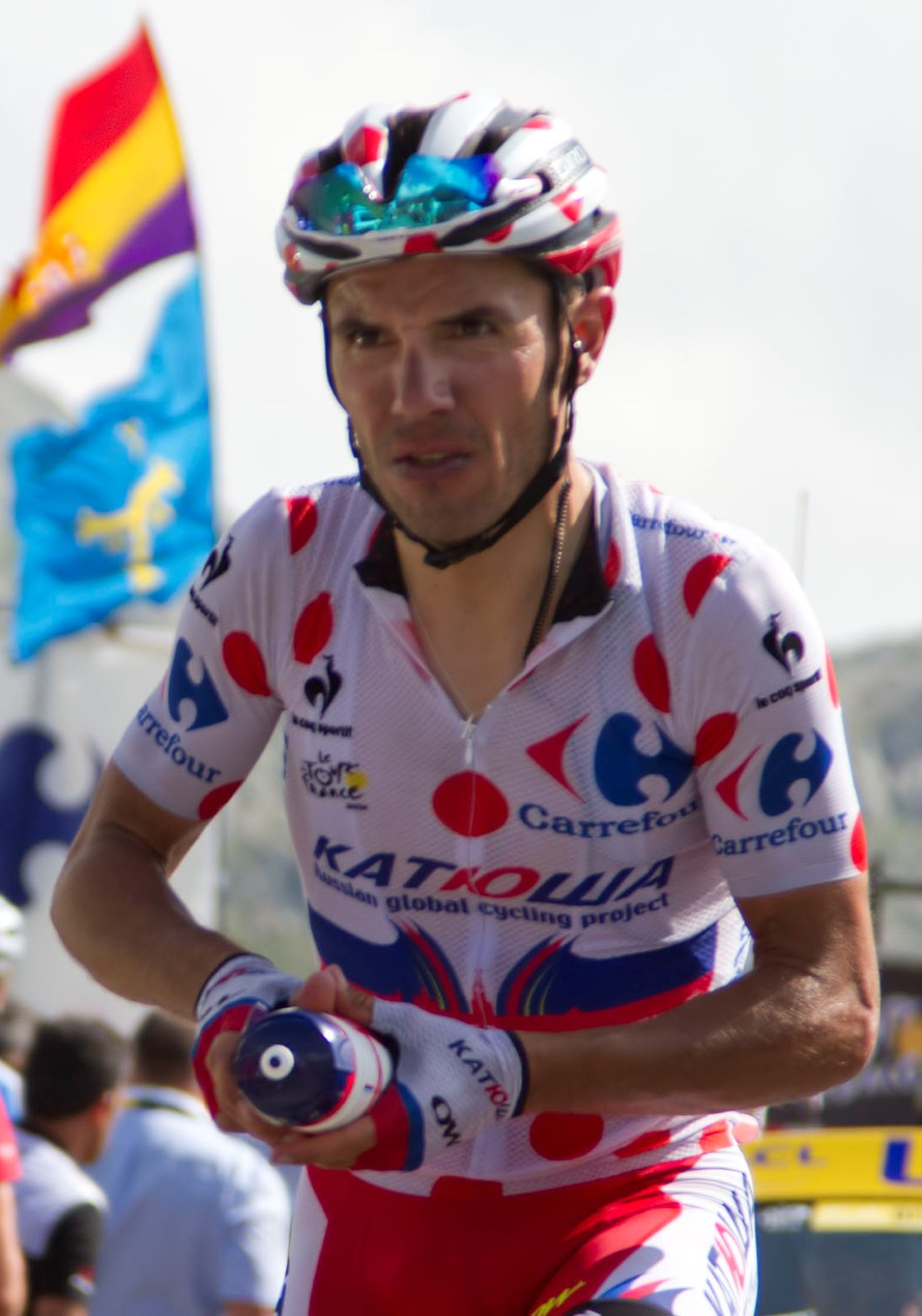 042 rodriguez